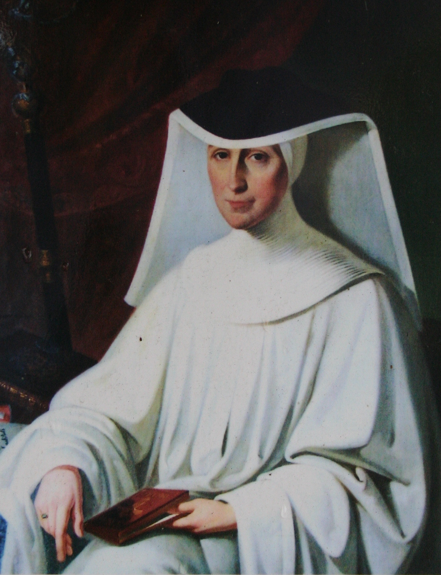 Kloster Wurmsbach: Äbtissin Aloisia Coelestina Müller, 1808 - 1888